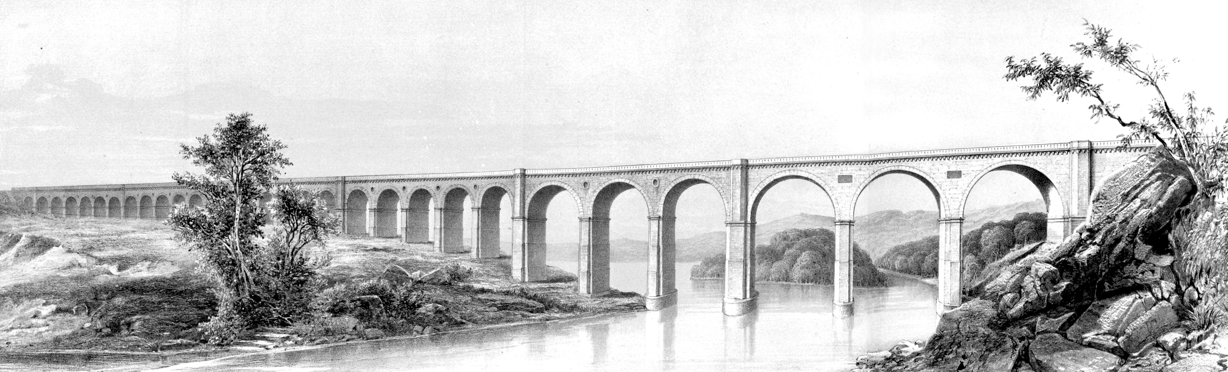 Neisse-Viaduct bei Görlitz, 1855